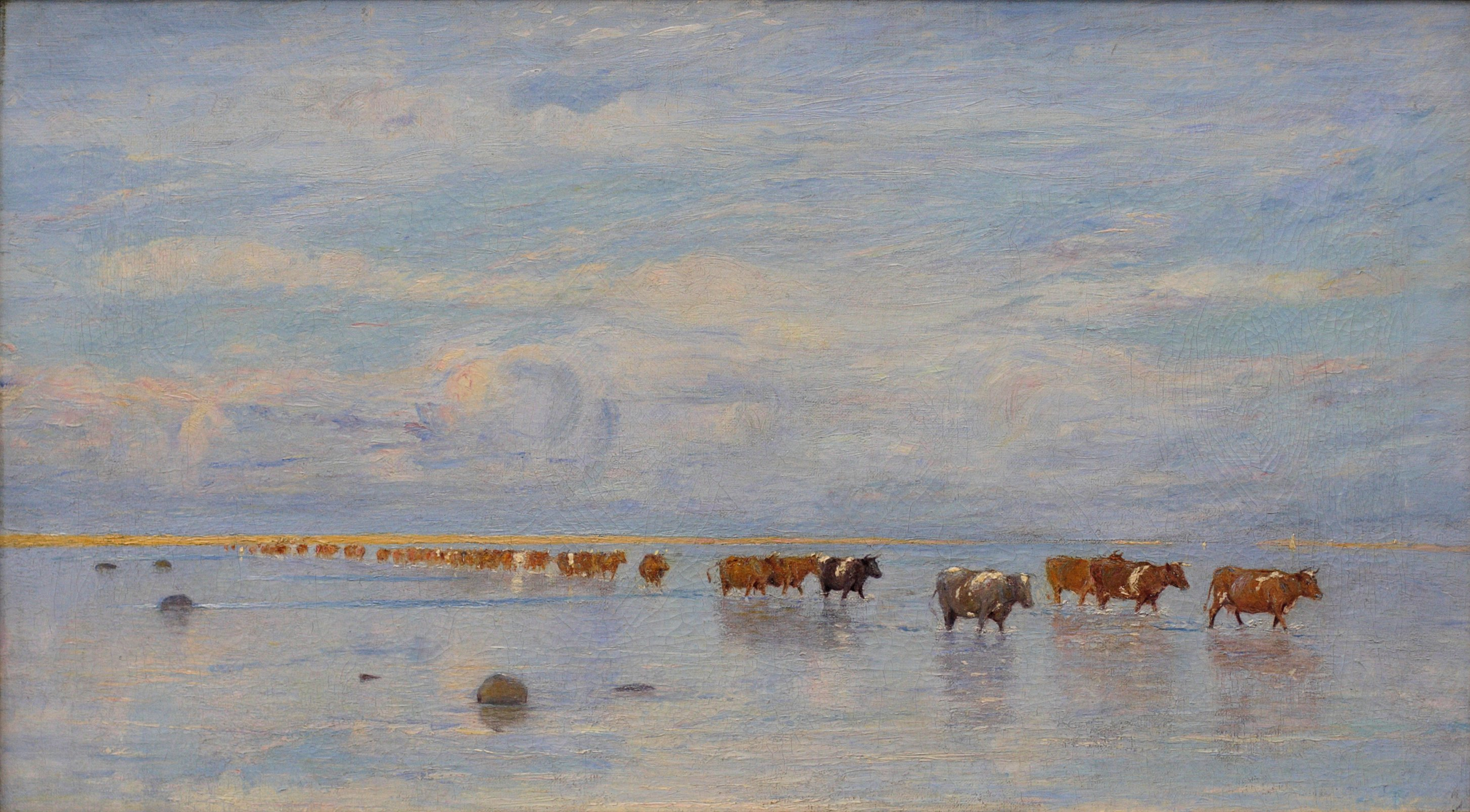 Ifølge Randers Kunstmuseum er maleriet "tidligere tilskrevet Theodor Philipsen under betegnelsen Køer, Saltholm"